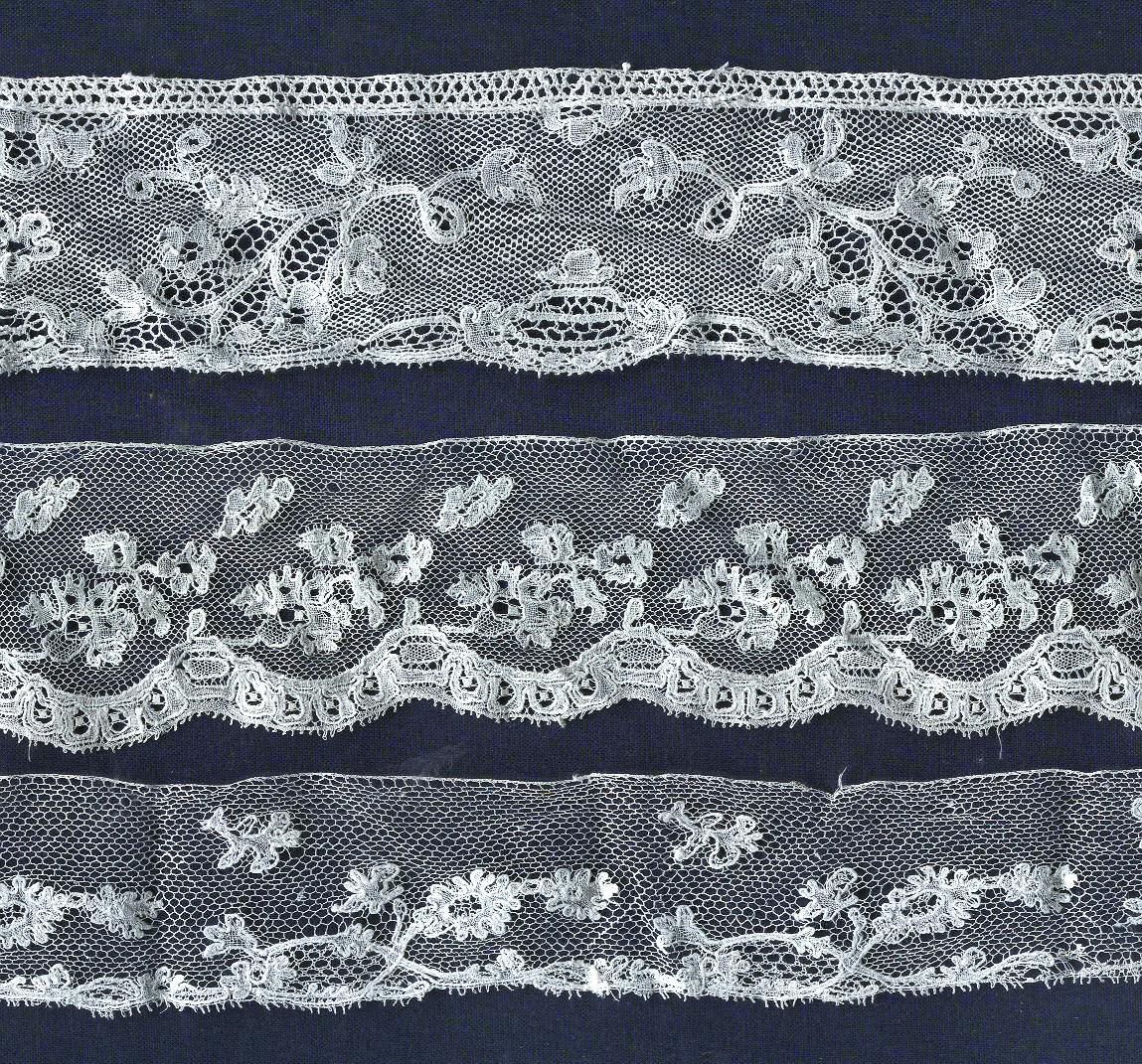 private collection